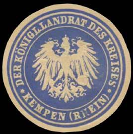 Sealing stamp Title: Der K. Landrat des Kreises Kempen/Rhein Description: blau, weiß, geprägt Place: Kempen/Rhein size: 3 cm